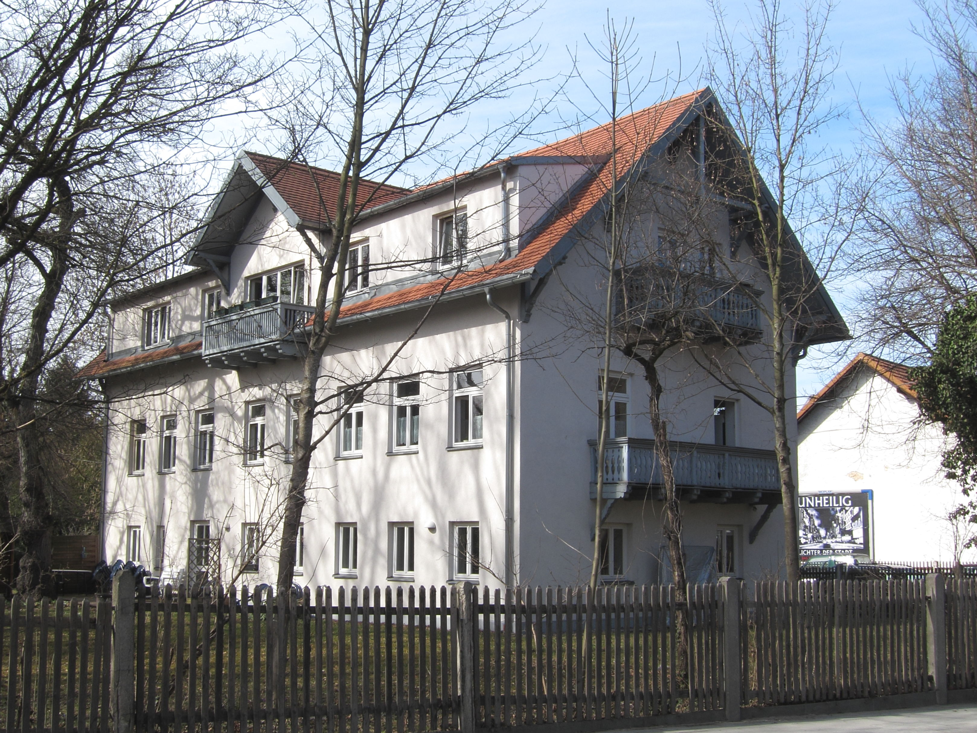 Lützowstraße 1; Vorstadthaus, Schweizer Stil, um 1900; im Vorgarten Hirschfigur.